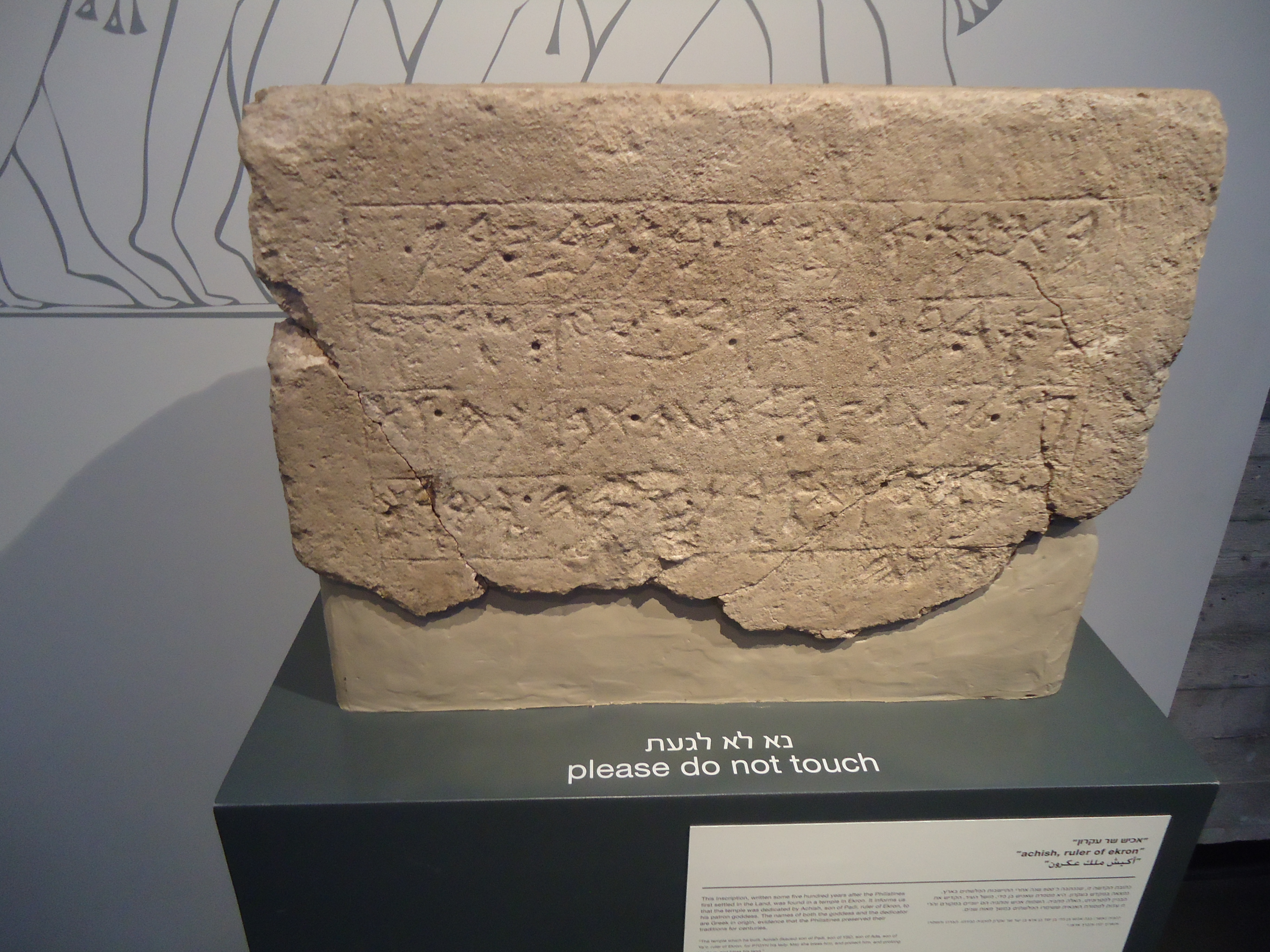 כתובת עקרון - כתובת פלשתית שנחשפה בשנת 1996, במהלך חפירות ארכאולוגיות, בתל מקנה, המזוהה עם עקרון המקראית. נמצאת כיום במוזיאון ישראל